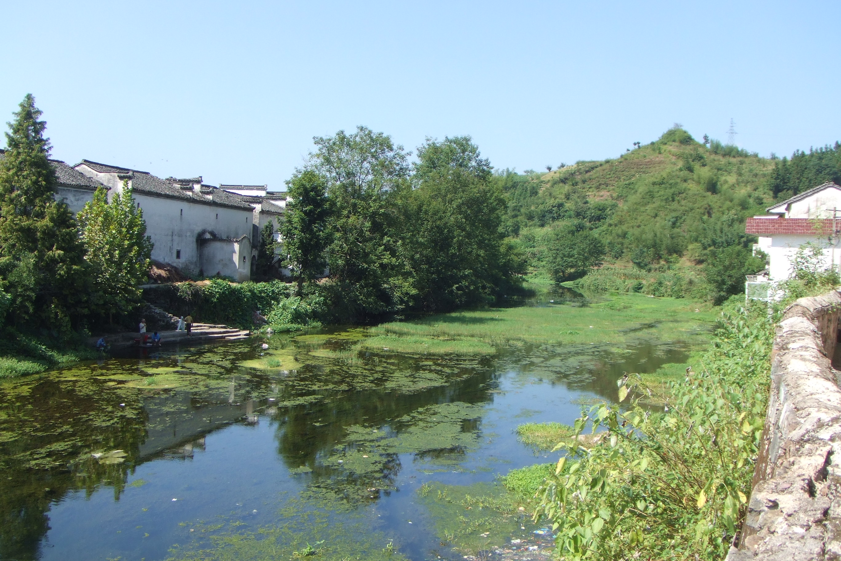 綿溪河外觀